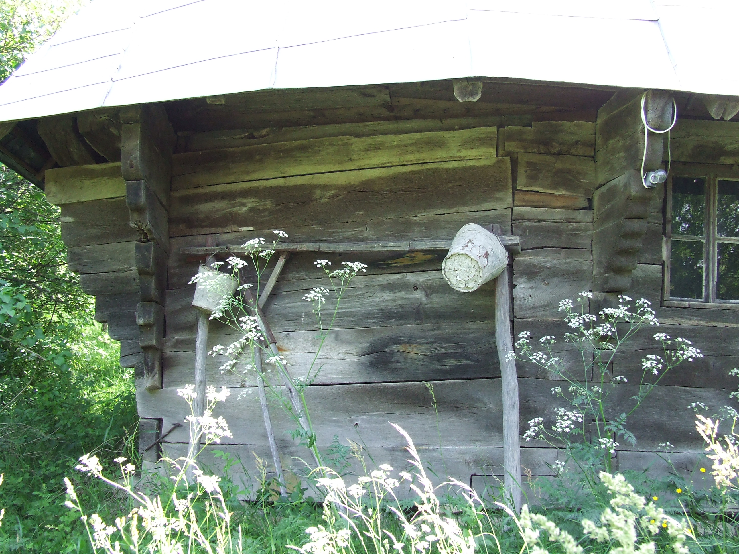 Biserica de lemn din Şardu. Vedere laterală a absidei altarului.